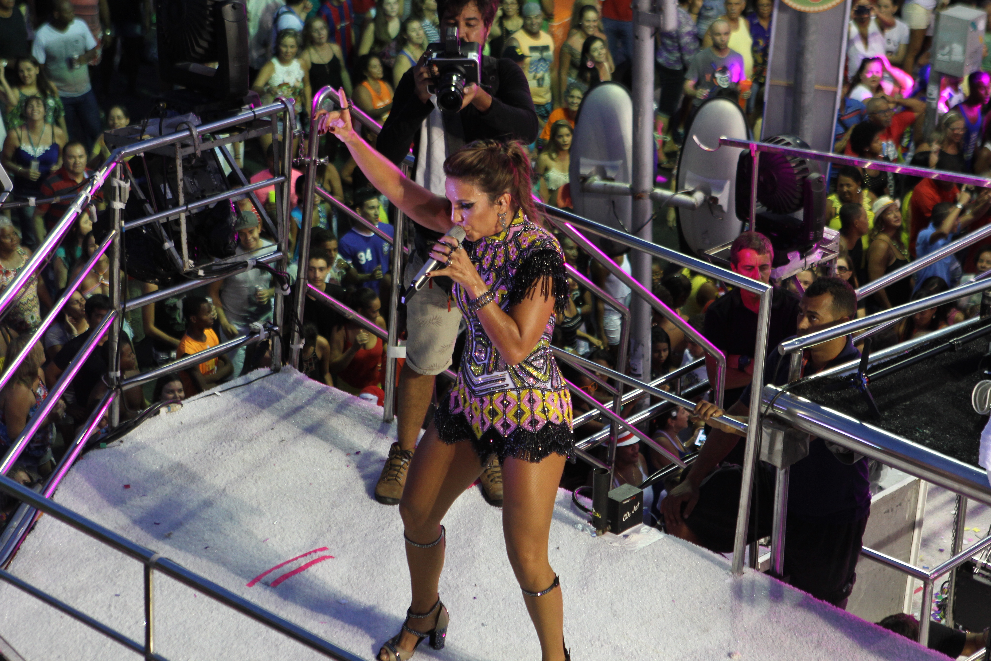 Ivete Sangalo durante o Carnaval de 2016 em Salvador.